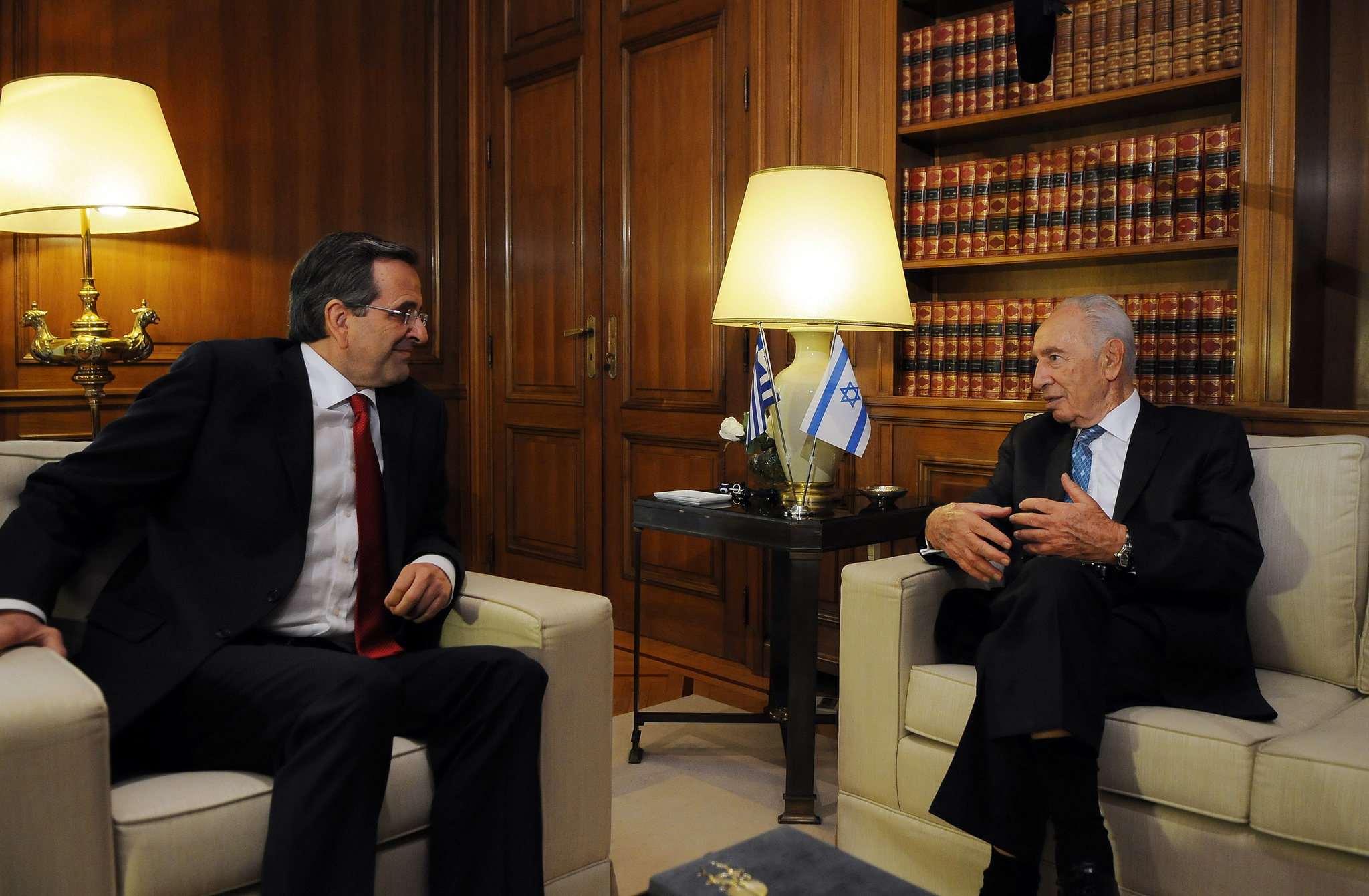 Αντώνης Σαμαράς - Συνάντηση με τον Πρόεδρο του Ισραήλ κ. Shimon Peres